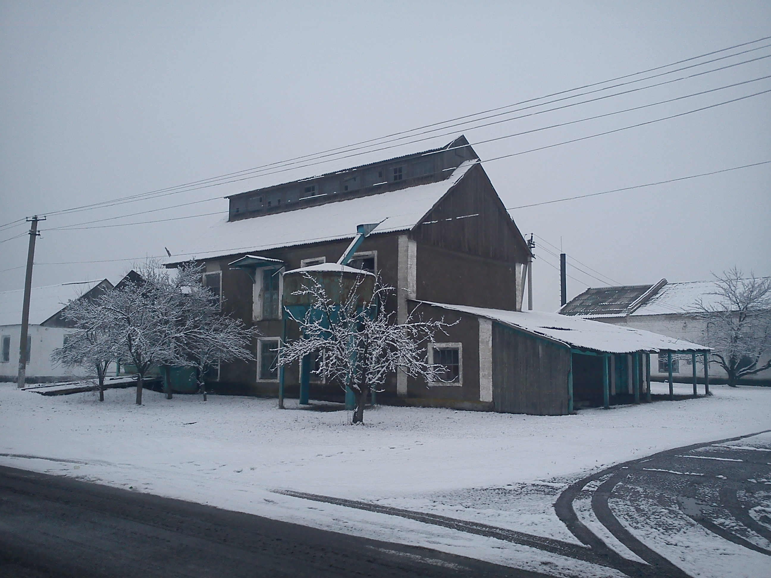 Булахівський млин